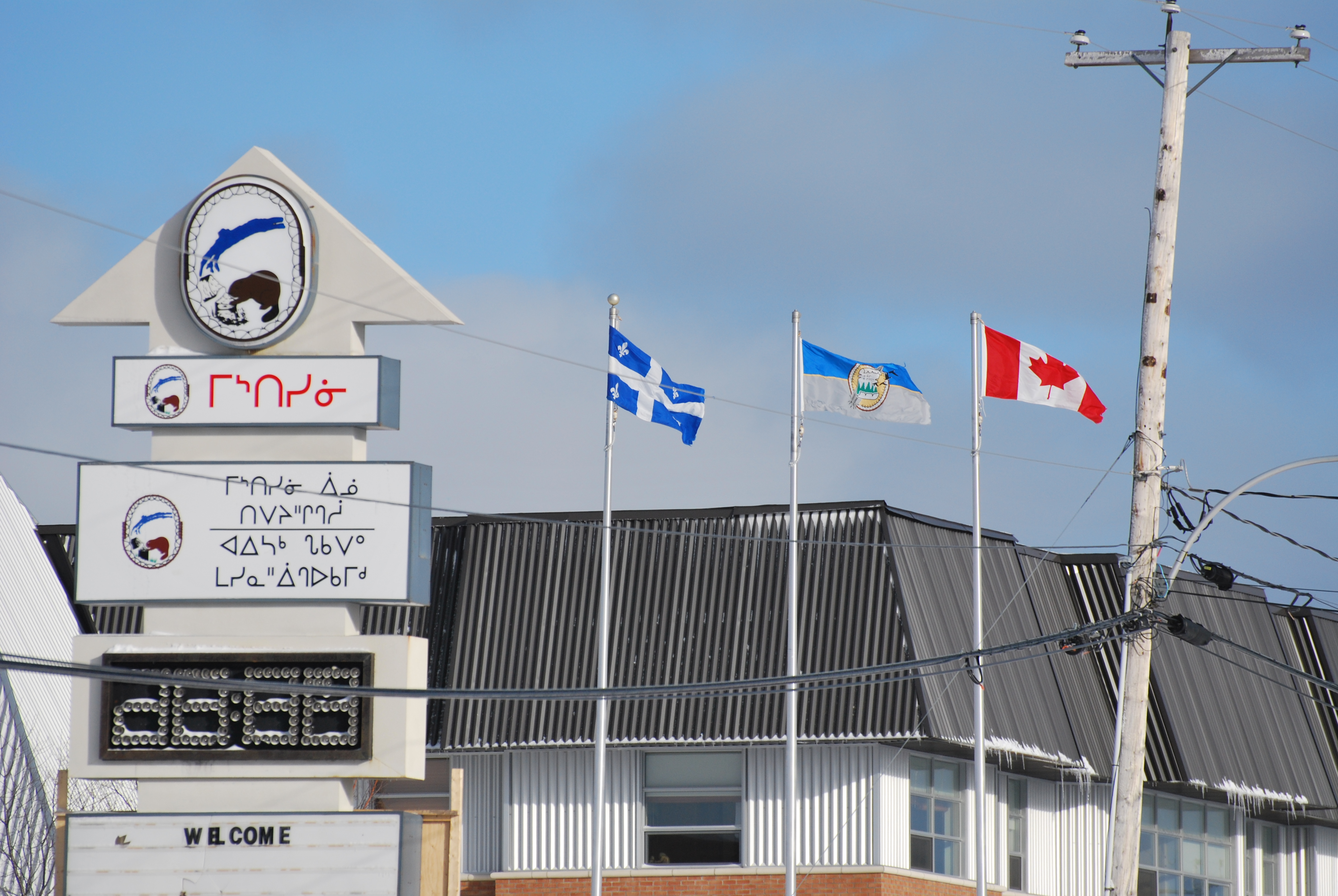 Mistissini.